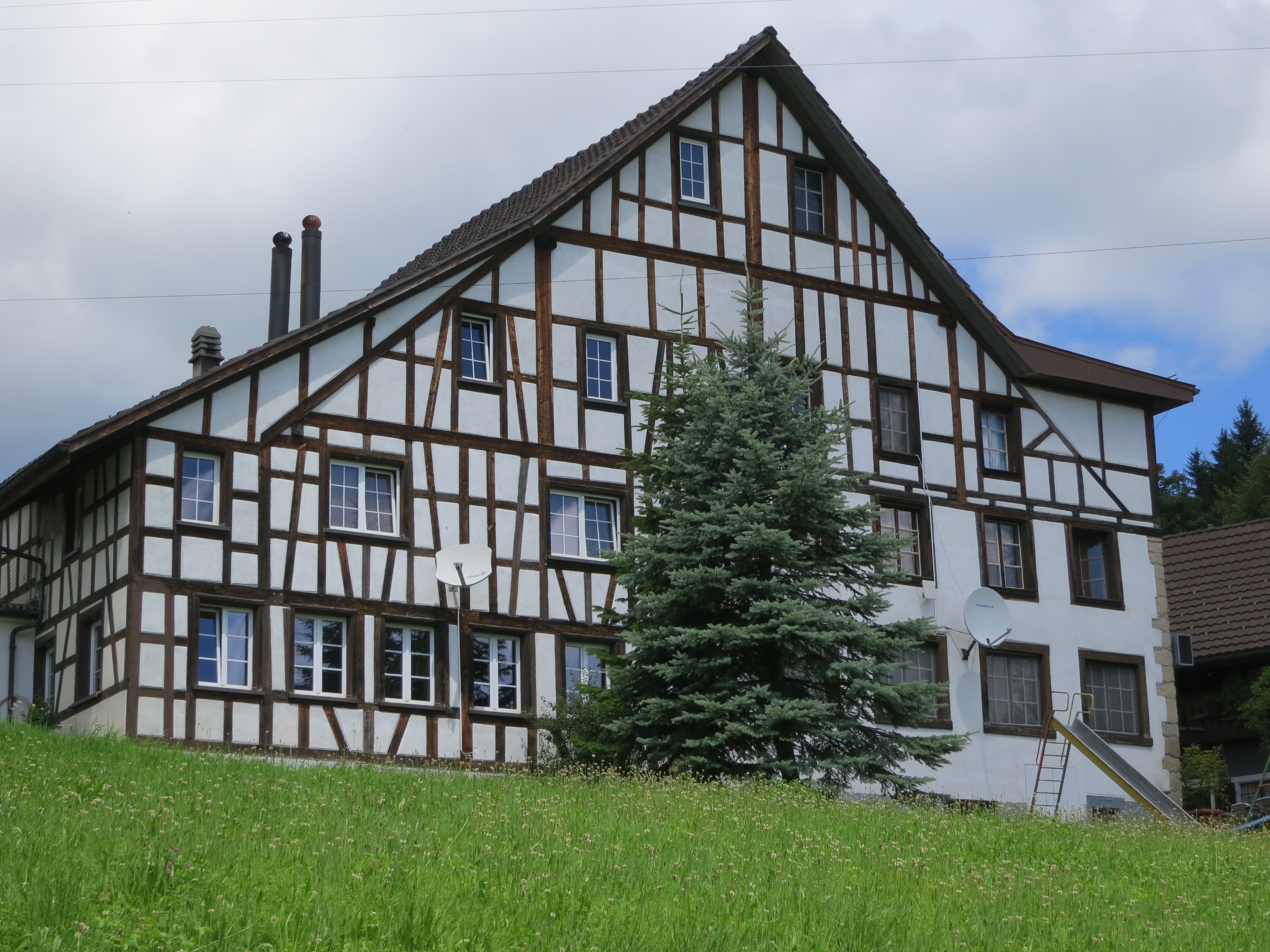 Restaurant Schweikhof, Ebertswil, Hausen am Albis ZH, Schweiz